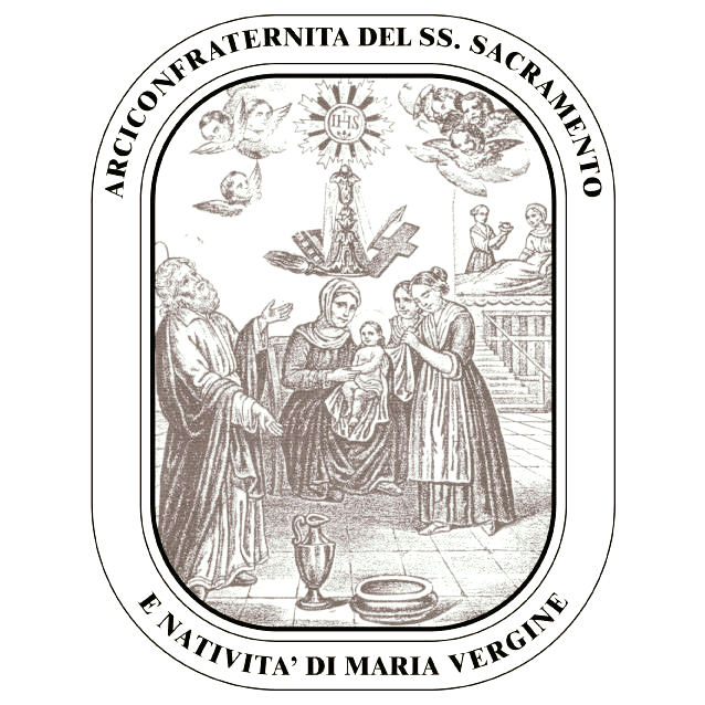 Stemma dell'Arciconfraternita del Santissimo Sacramento e natività di Maria Vergine.